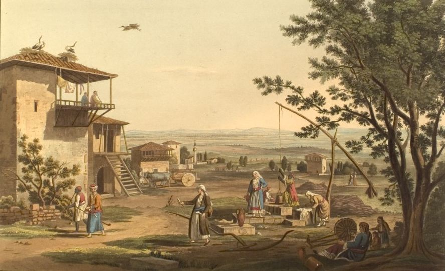 Larissa